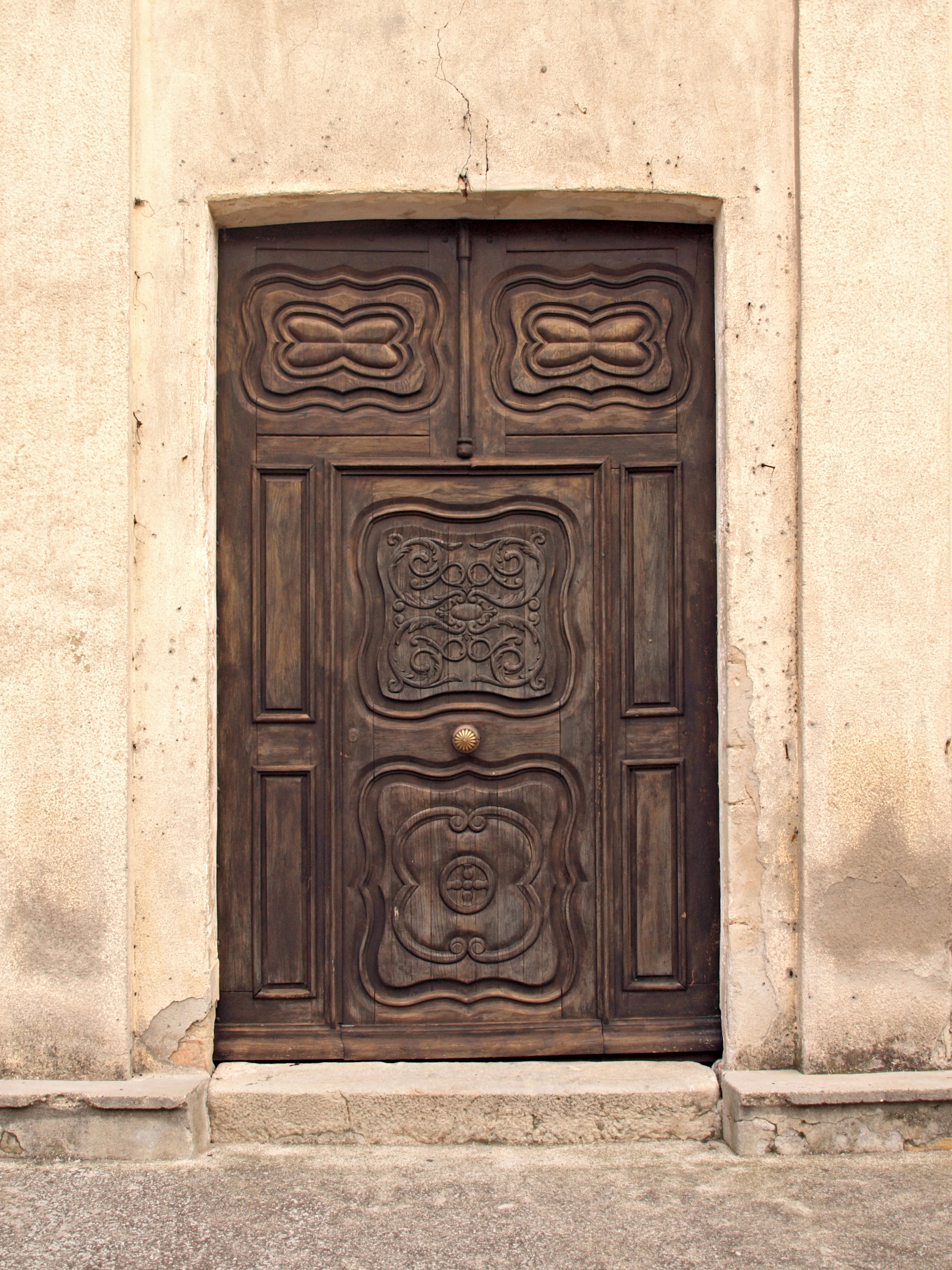 Aléria (Corsica) - Porte d'entrée de l'église paroissiale Saint-Marcel